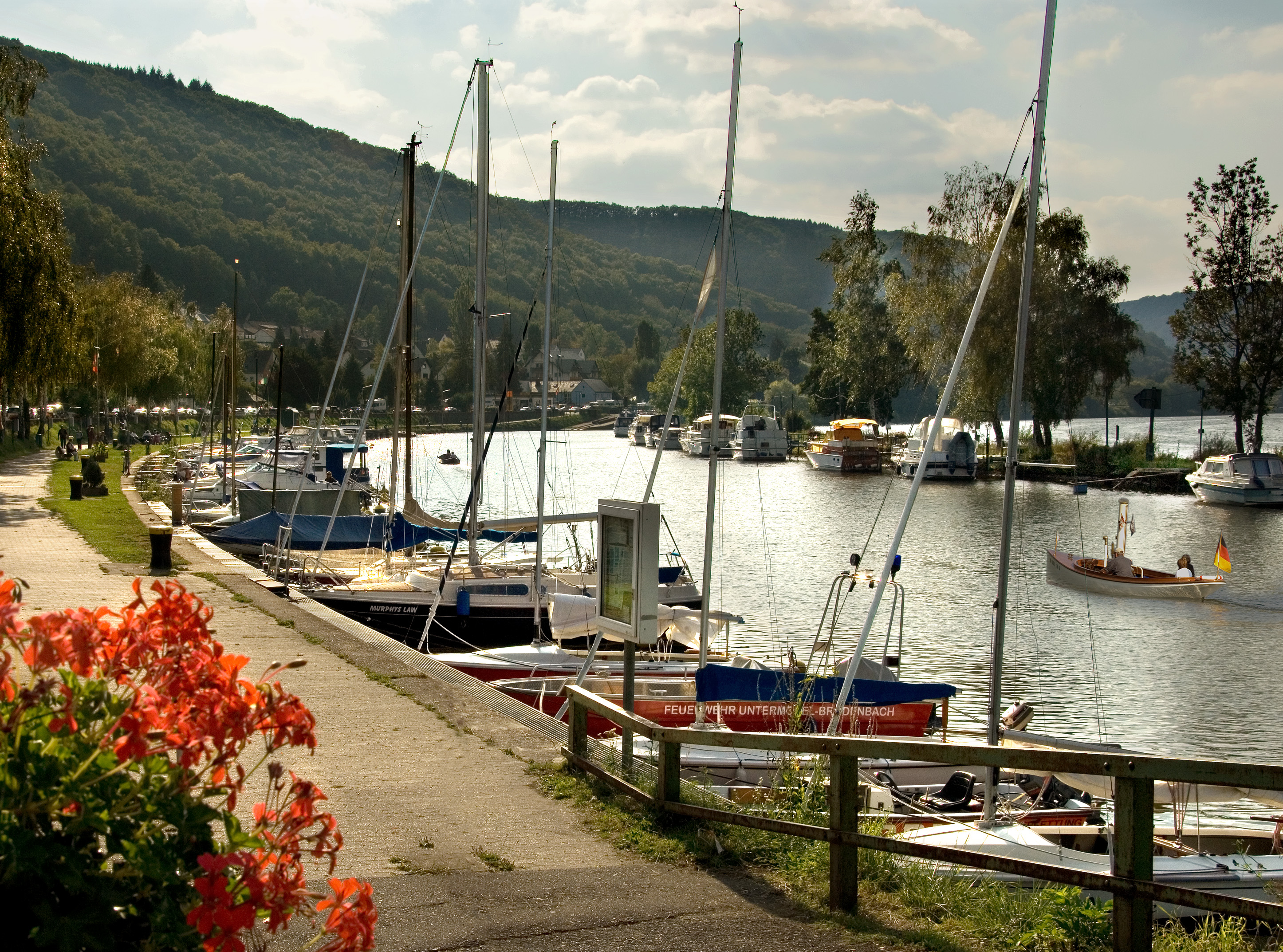 Wassersporthafen und Promenade von Brodenbach